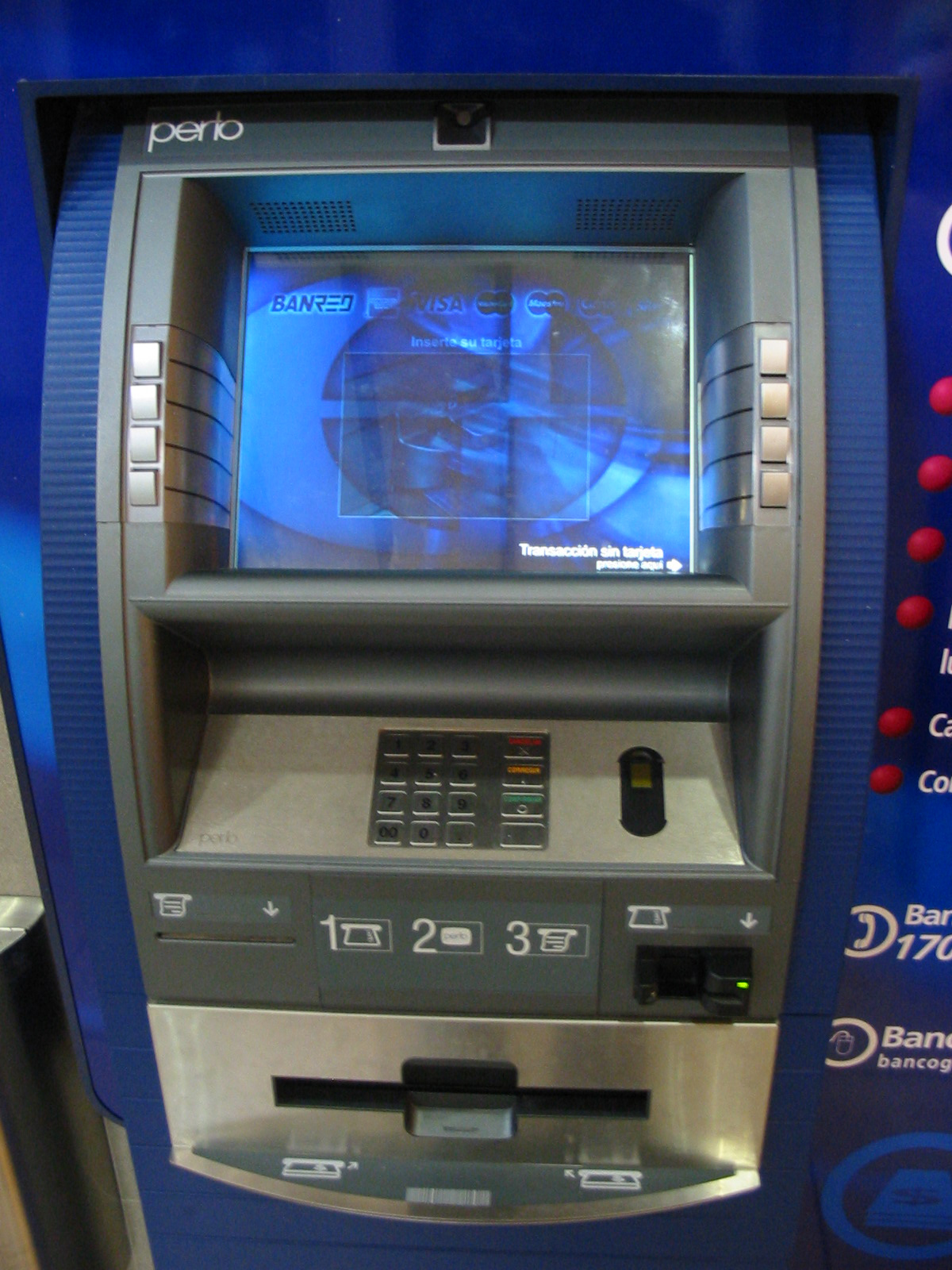 Perto PertoFit ATM (Automatic Teller Machine). Possible TMF-4150 Full Function Mini ATM model.